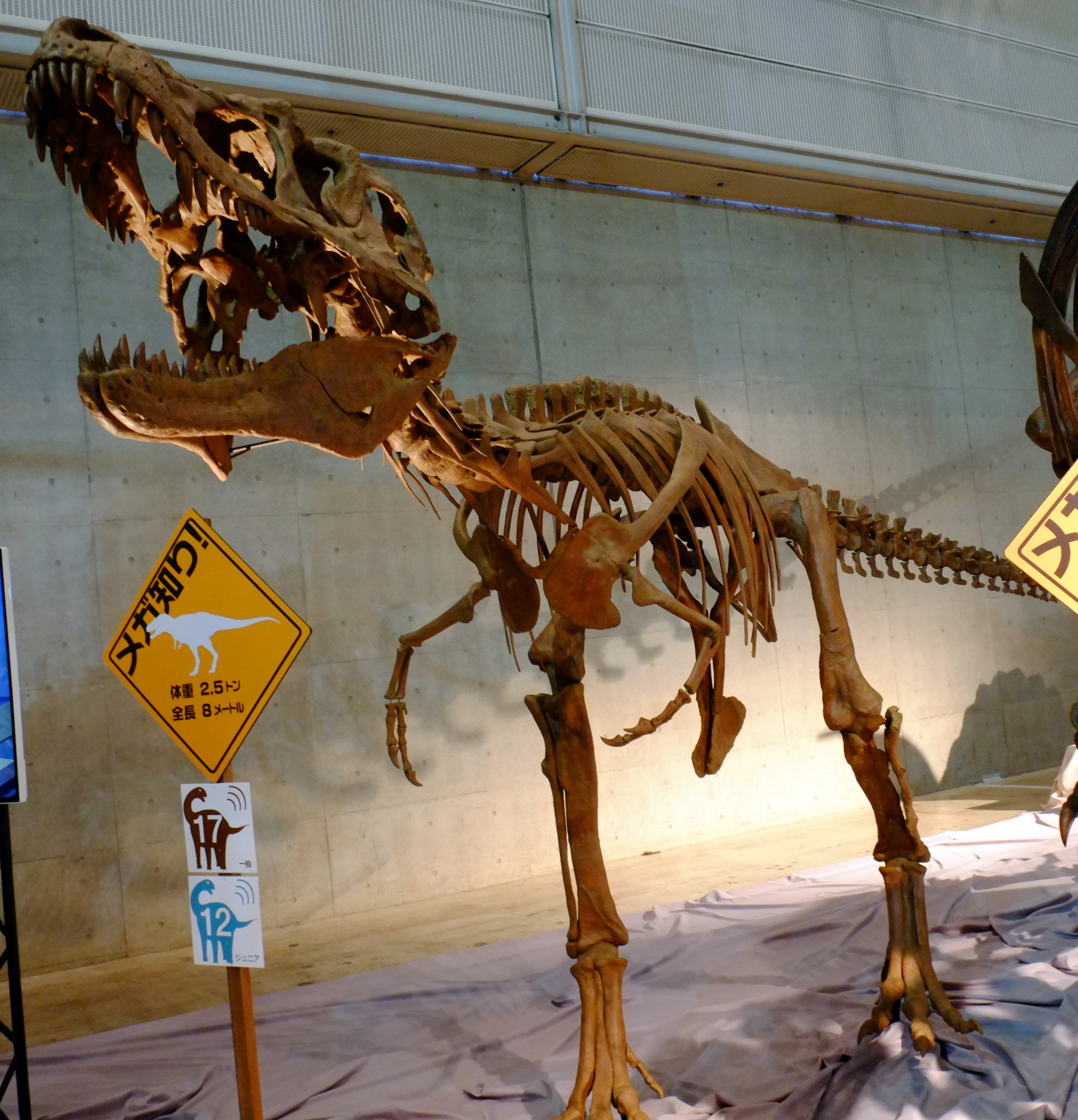 ライスロナックスの発見によりティラノサウルス類の出現が7000万年前から8000万年前に塗り替えられた。